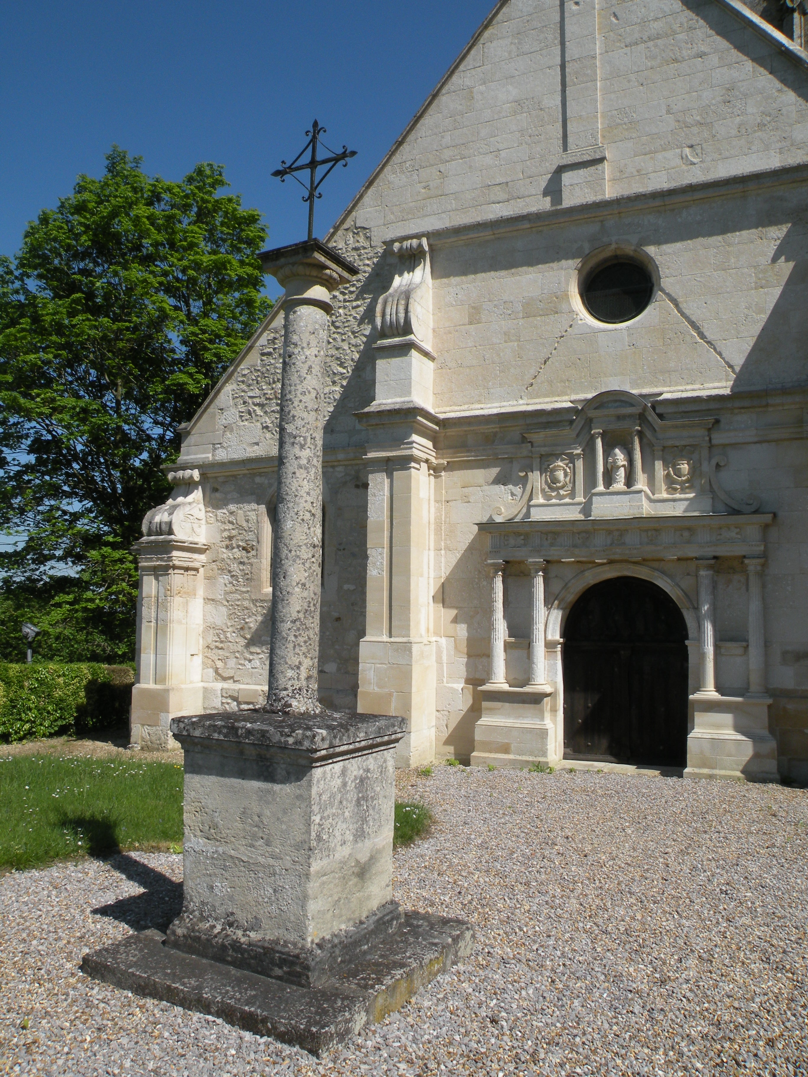 croix devant l'Église Saint-Denis de Berville